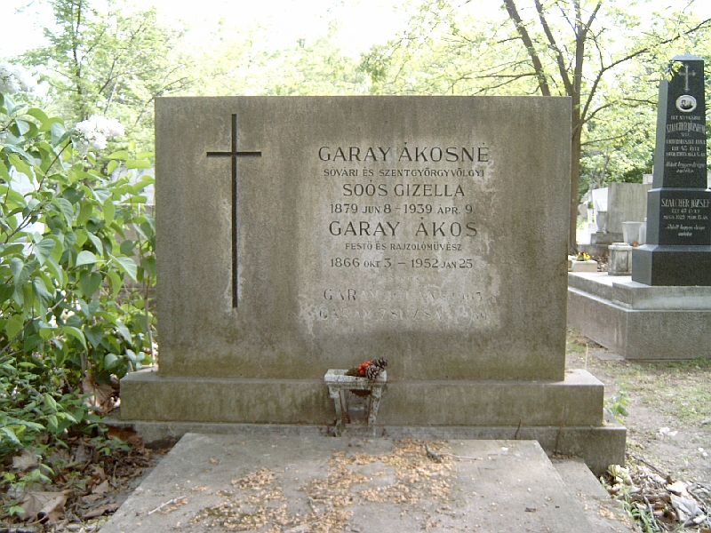 Garay Ákos (Apáti, 1866. október 5. – Bp., 1952. január 25.) festő, grafikus, etnográfus sírja Budapesten. Új köztemető: 34-1-14.